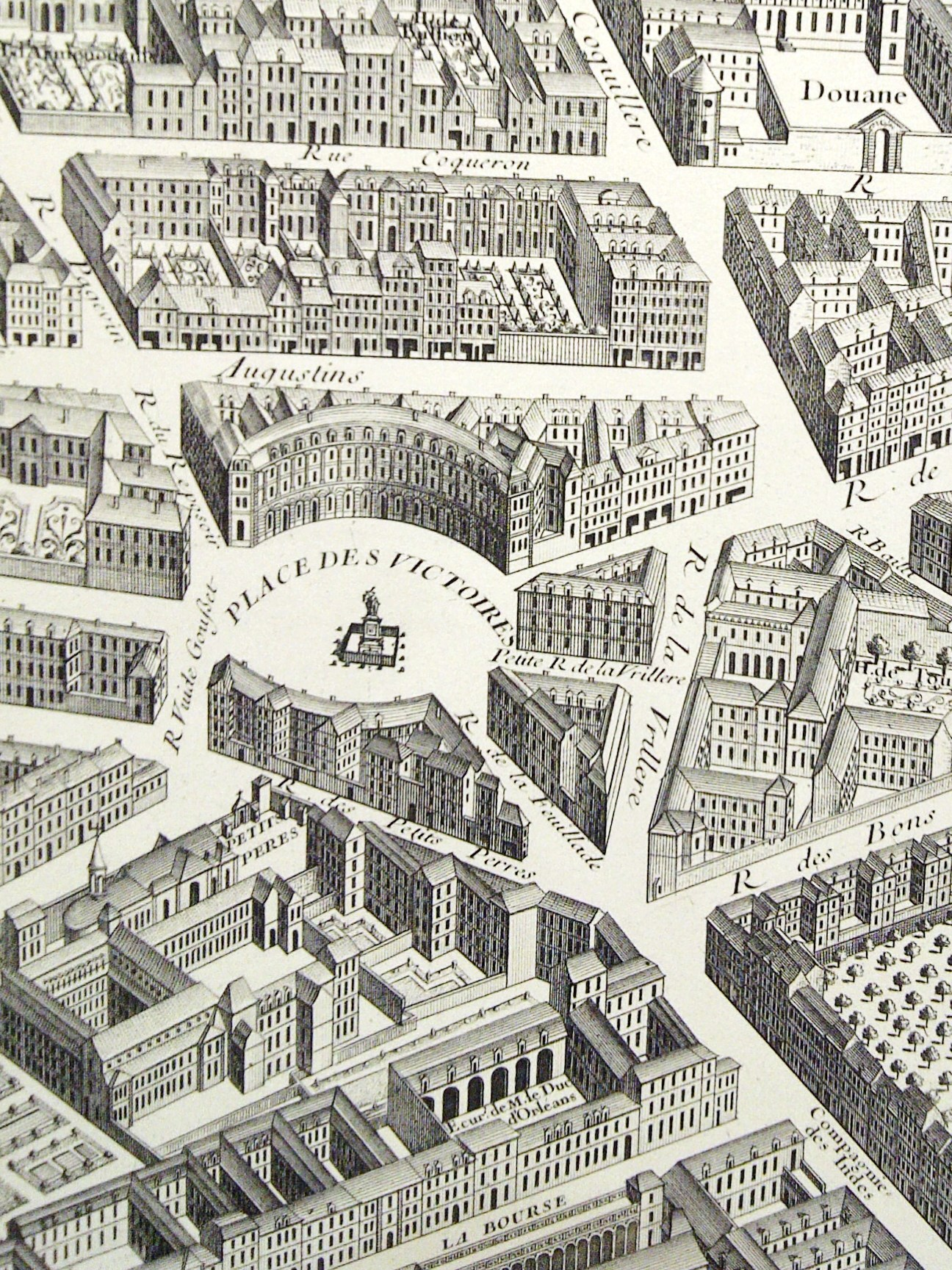 Kupferstich: Quartier des Victoires (1739)